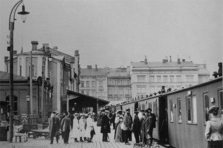 Matkustajia nousemassa junaan Helsingin vanhalla asemalla 1907